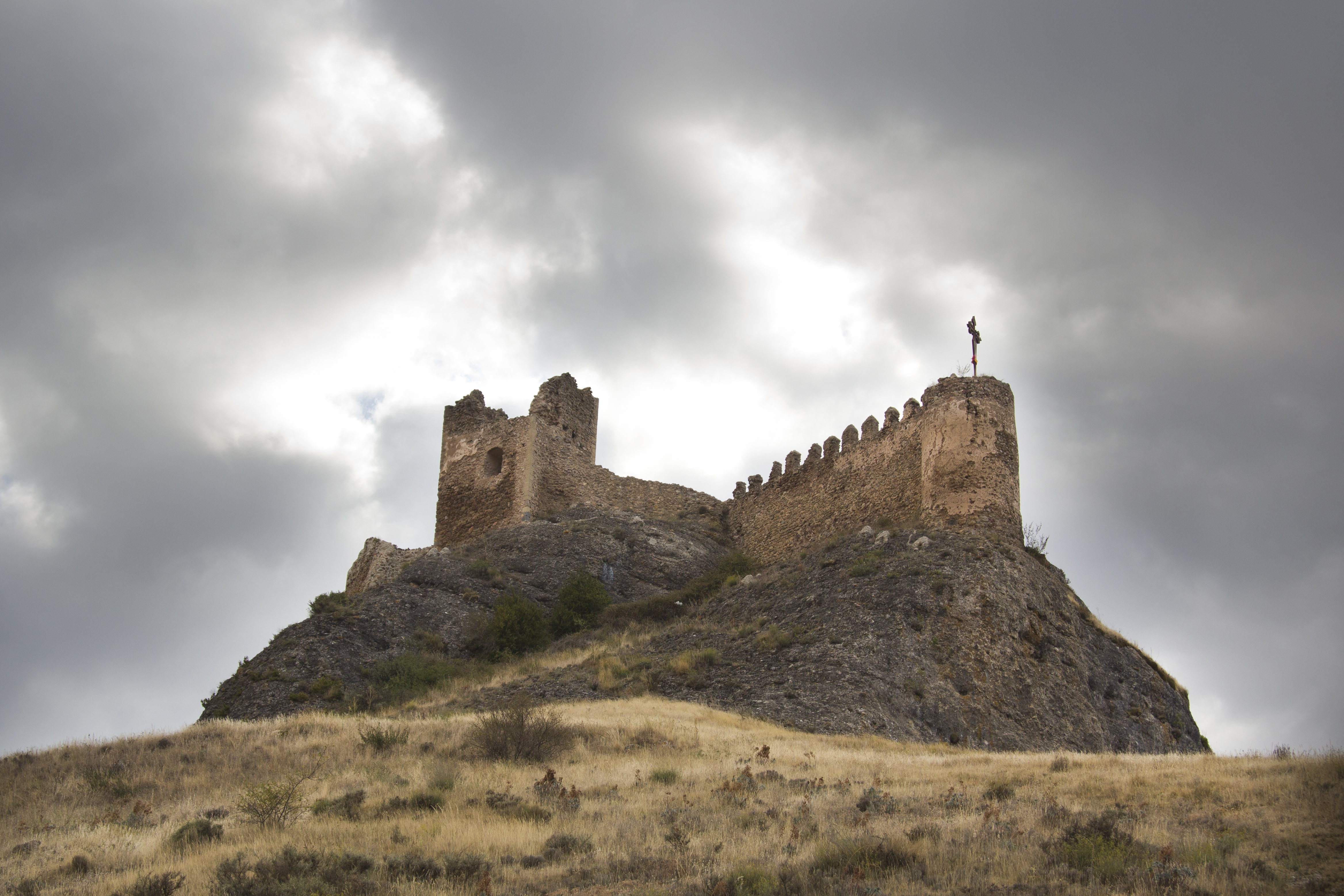 Castillo de origen árabe ubicado en la localidad riojana de Clavijo. Se construyó alrededor del siglo X y las murallas en el siglo XII al XIII.